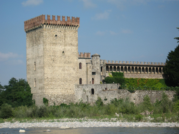 Il castello di Riva a Ponte dell'Olio (PC) visto dal torrente Nure.